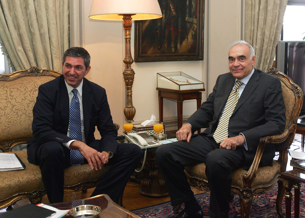 Από την Τετάρτη 12 έως και την Παρασκευή 14 Οκτωβρίου 2011, ο Υπουργός Εξωτερικών Σταύρος Λαμπρινίδης θα πραγματοποιήσει επισκέψεις στην Αίγυπτο, την Ιορδανία και το Λίβανο. Πρώτος σταθμός της περιοδείας του Υπουργού Εξωτερικών είναι το Κάιρο, όπου ο Υπουργός πραγματοποιεί συναντήσεις με τον Υπουργό Εξωτερικών, τον Γενικό Γραμματέα του Αραβικού Συνδέσμου καθώς και τον Αναπληρωτή Υπουργό Επενδύσεων.